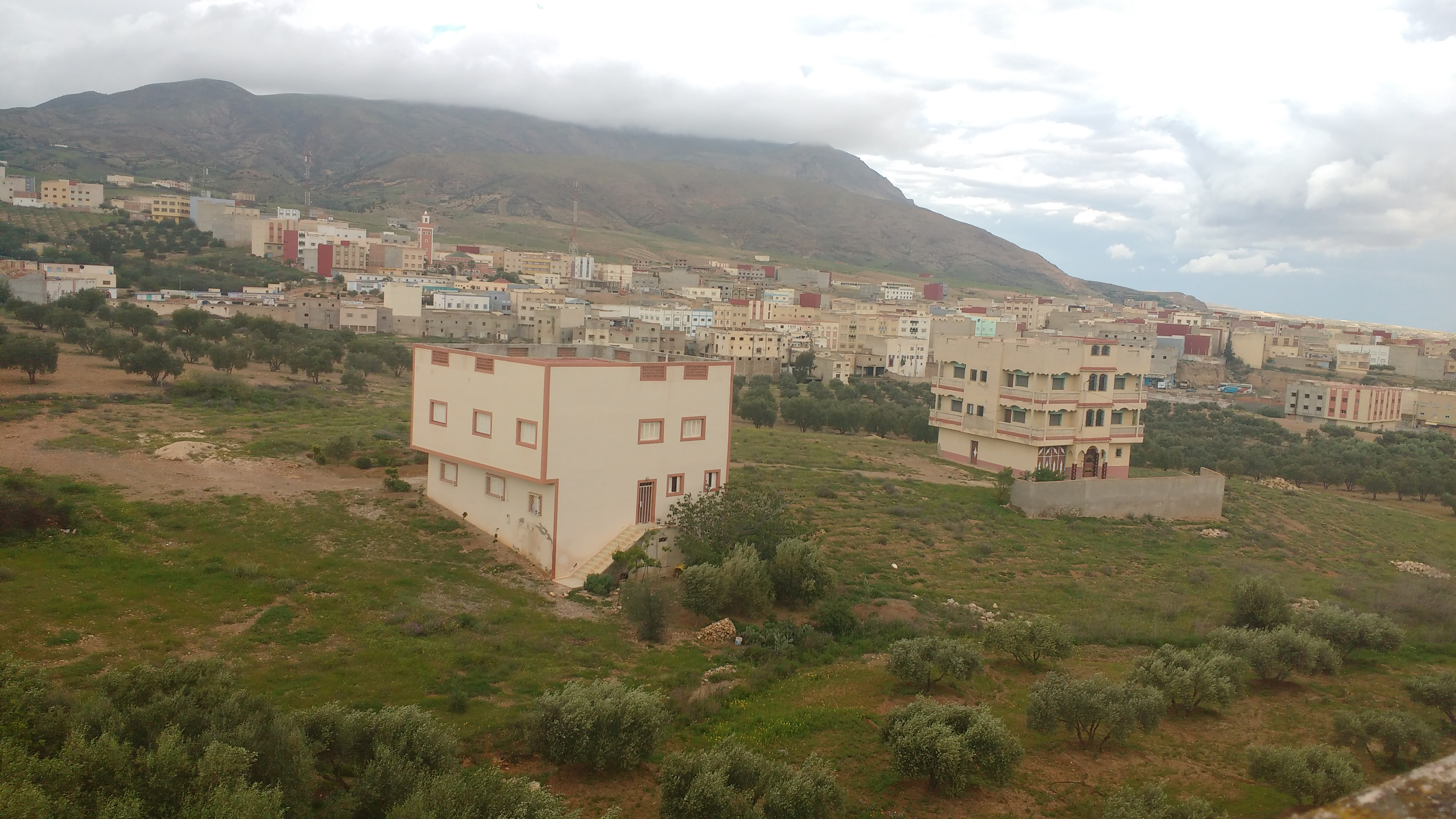 صورة لبلدة قاسيطة